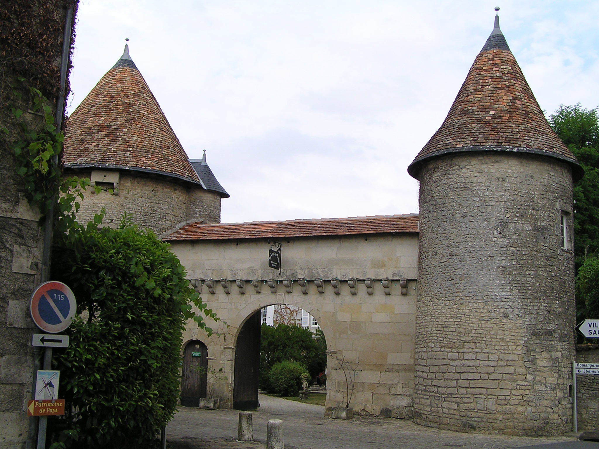 les tours de Villefagnan, Charente, France